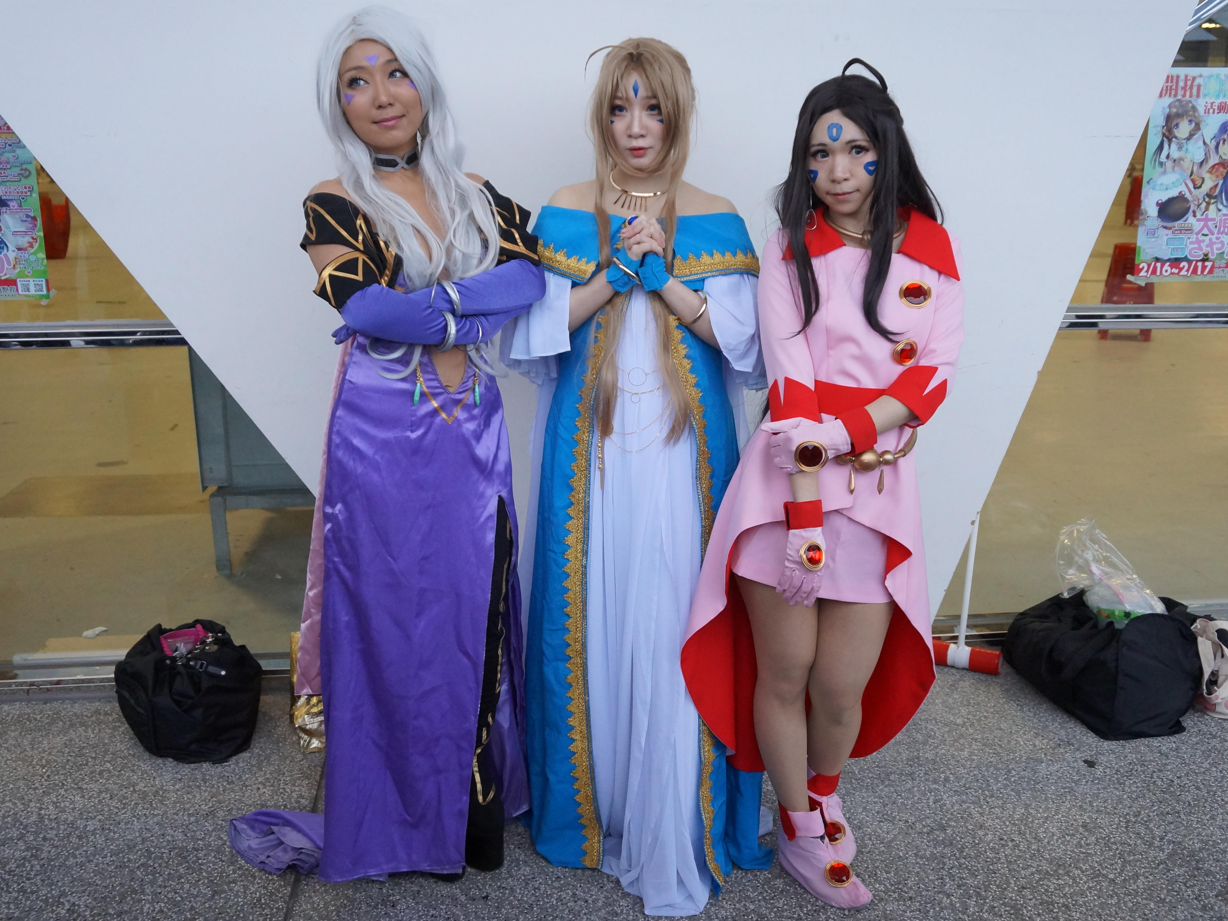 第33屆開拓動漫祭，《幸運女神》兀兒德（左）、蓓兒丹娣（中）、詩蔻蒂（右）cosplayer。